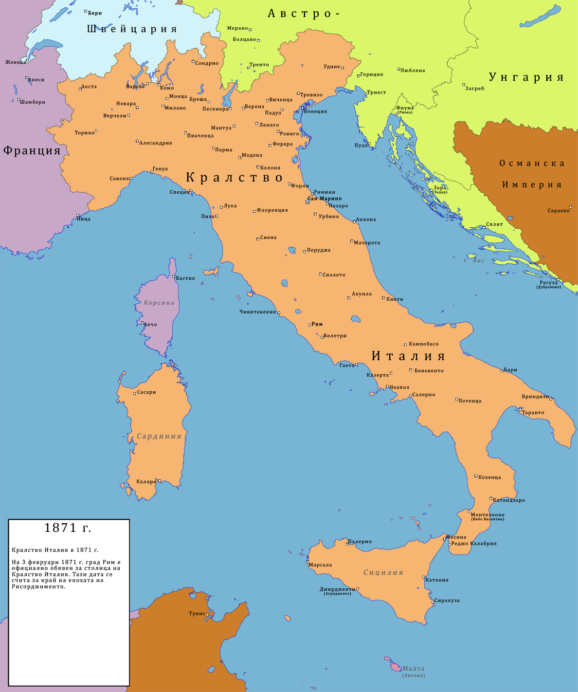 1871 г.: На 3 февруари 1871 г. град Рим е официално обявен за столица на Кралство Италия. Тази дата обикновено се счита за край на епохата на Рисорджименто.